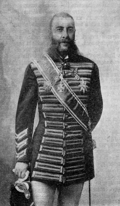 Дурново, Александр Дмитриевич курский губернский предводитель дворянства, шталмейстер.